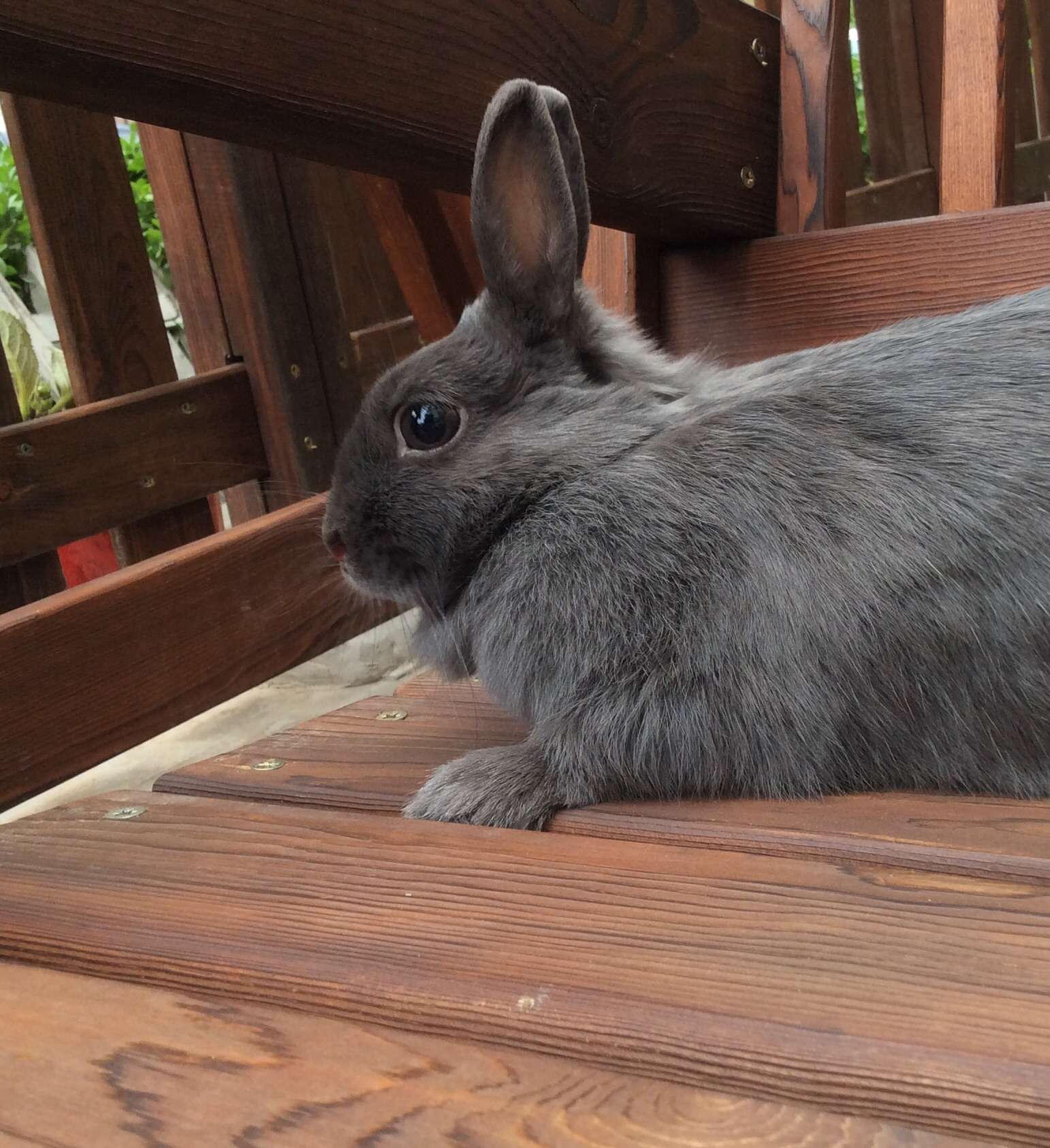 秋千上的宠物兔